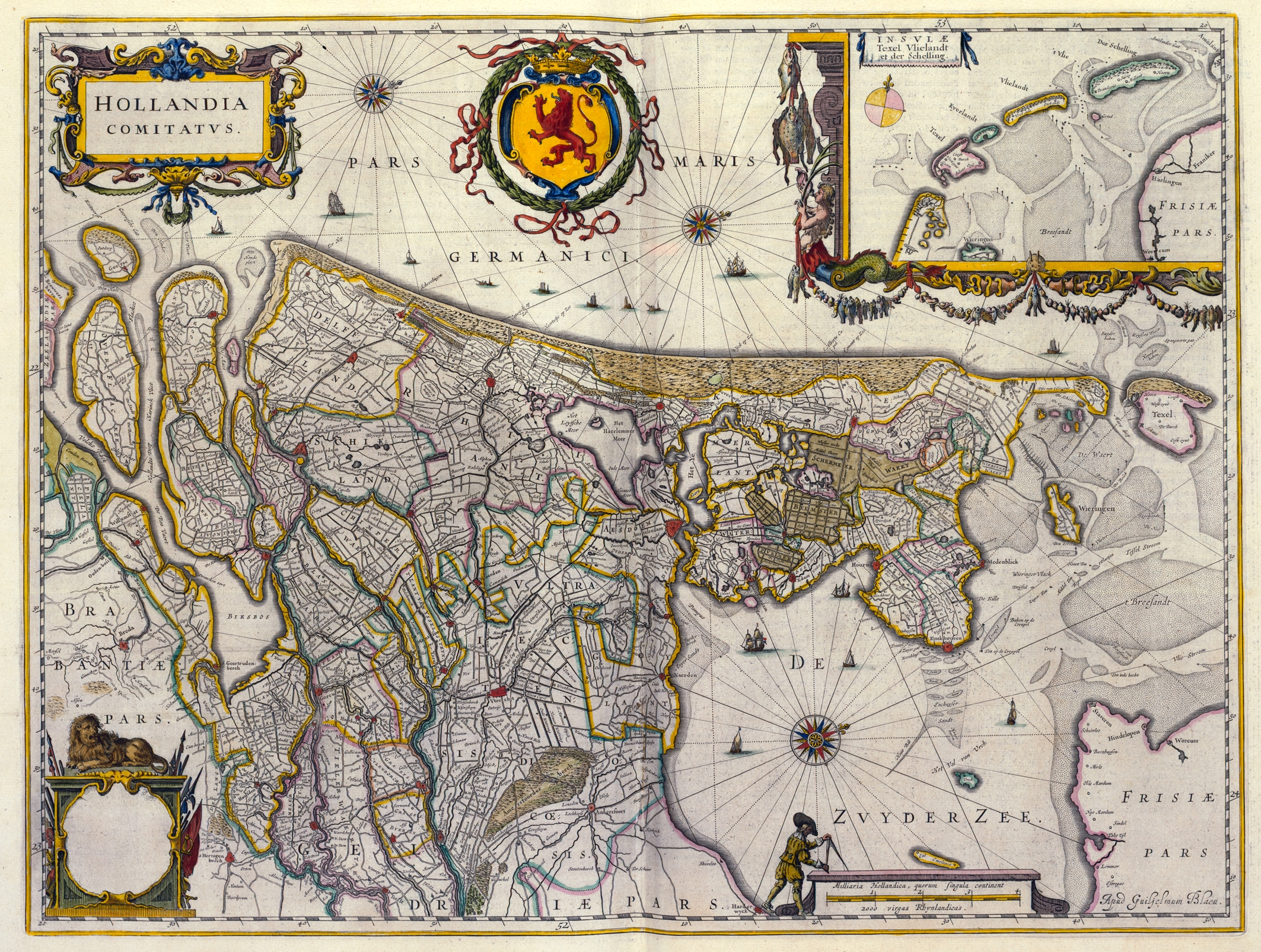 Hollandia Comitatus